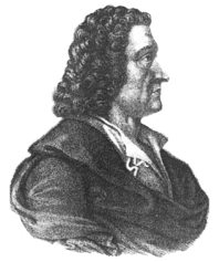 Johann Friedrich Boettger